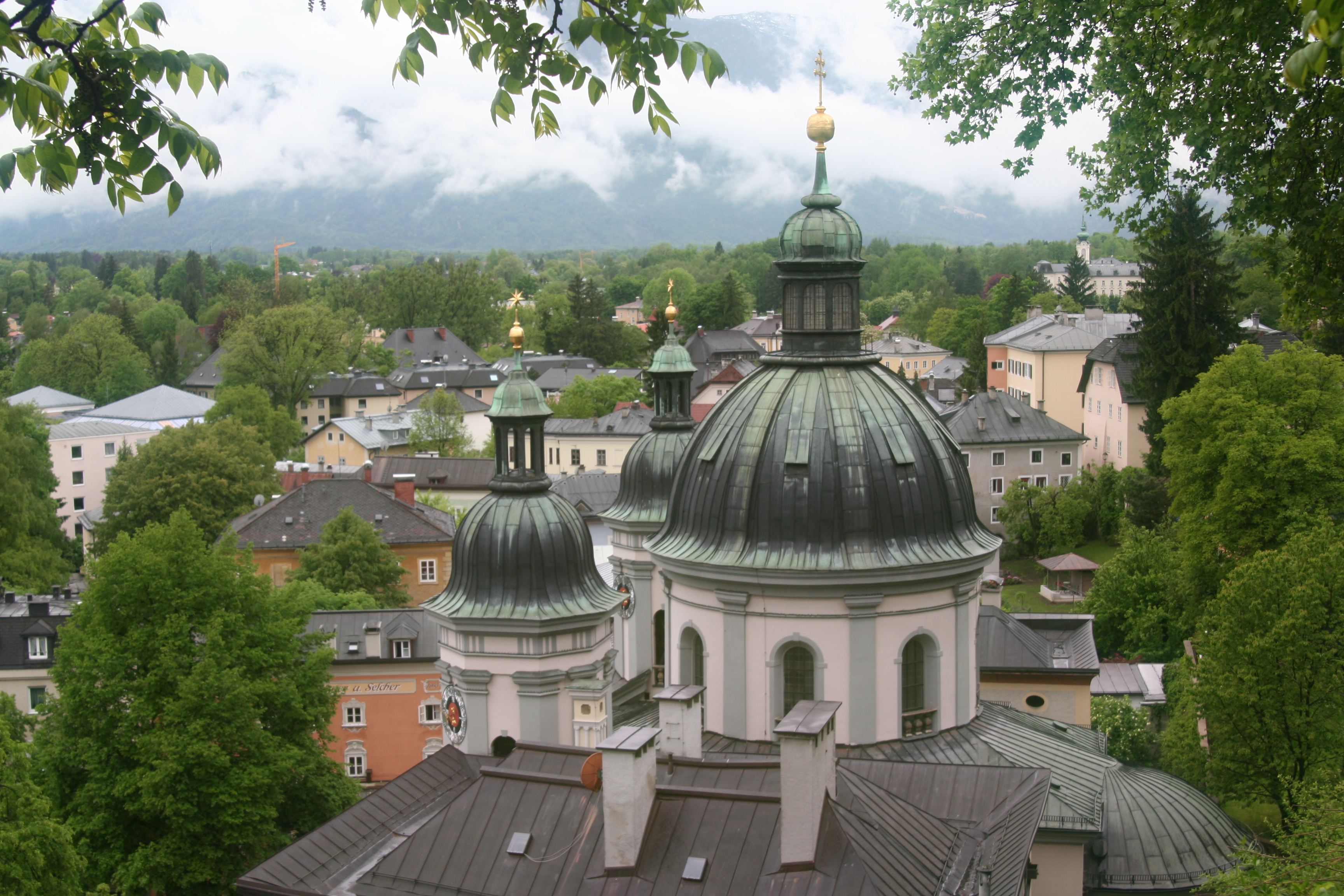 Erhardkirche